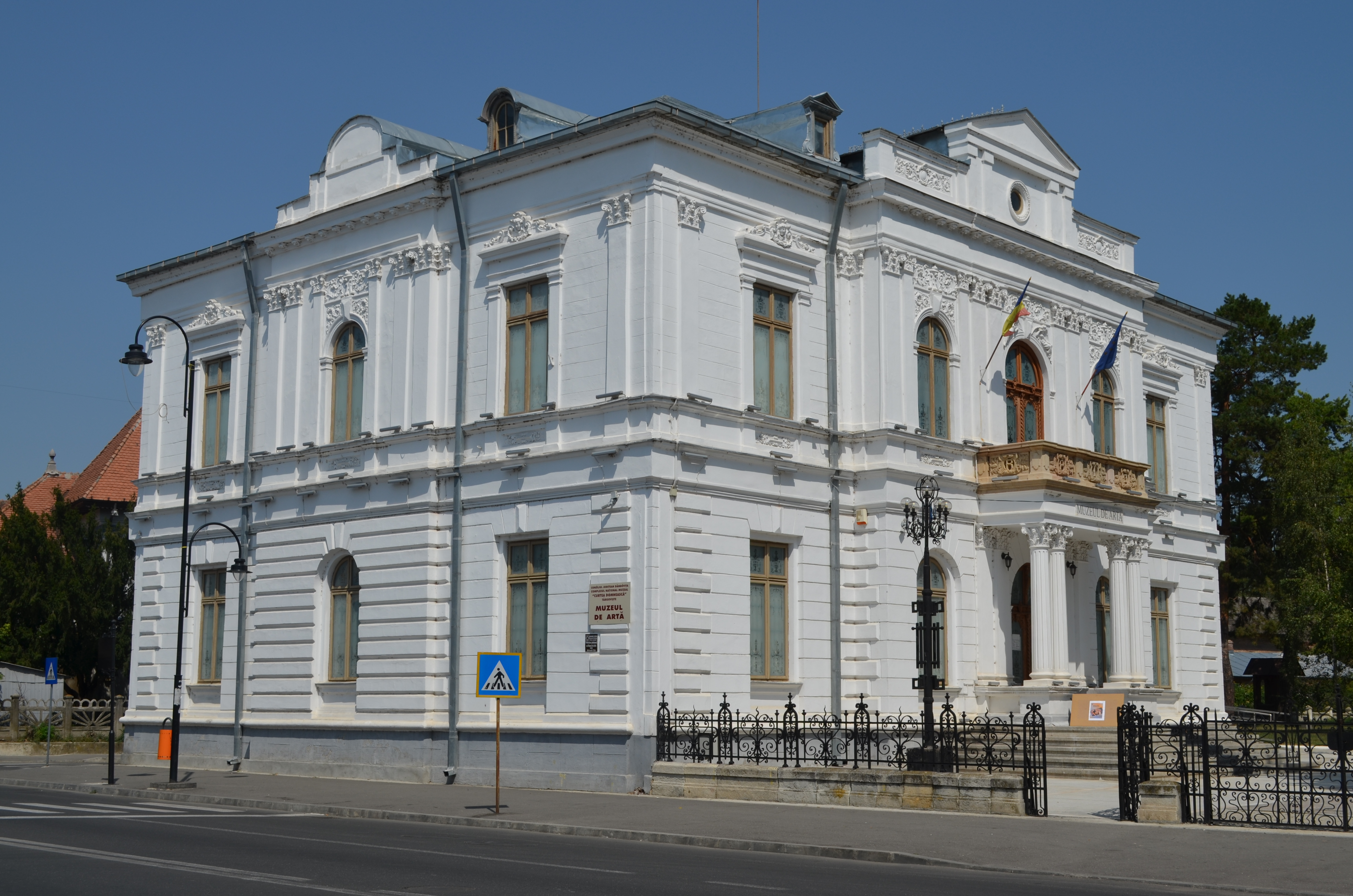 Prefectura județeană, azi Muzeul de Artă, Calea Domnească nr. 185, Târgoviște